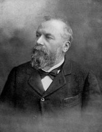 Antoine Magnin, botaniste français.